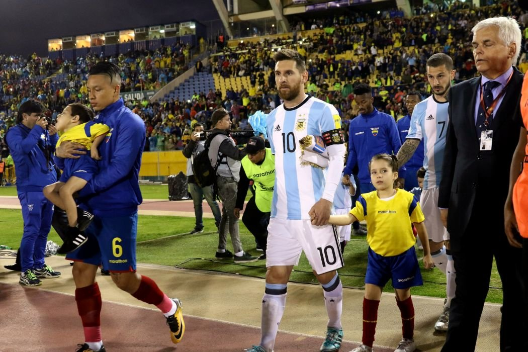 Quito, 10 oct (Andes).- Con tres tantos Argentina espantó los fantasmas de la eliminación, clasificó a su décima octava Copa del Mundo y venció 3-1 a un Ecuador que inició ganando el compromiso, disputado en el estadio Atahualpa de Quito, pero que no supo contener a uno de los mejores jugadores del mundo. ANDES/Micaela Ayala V.